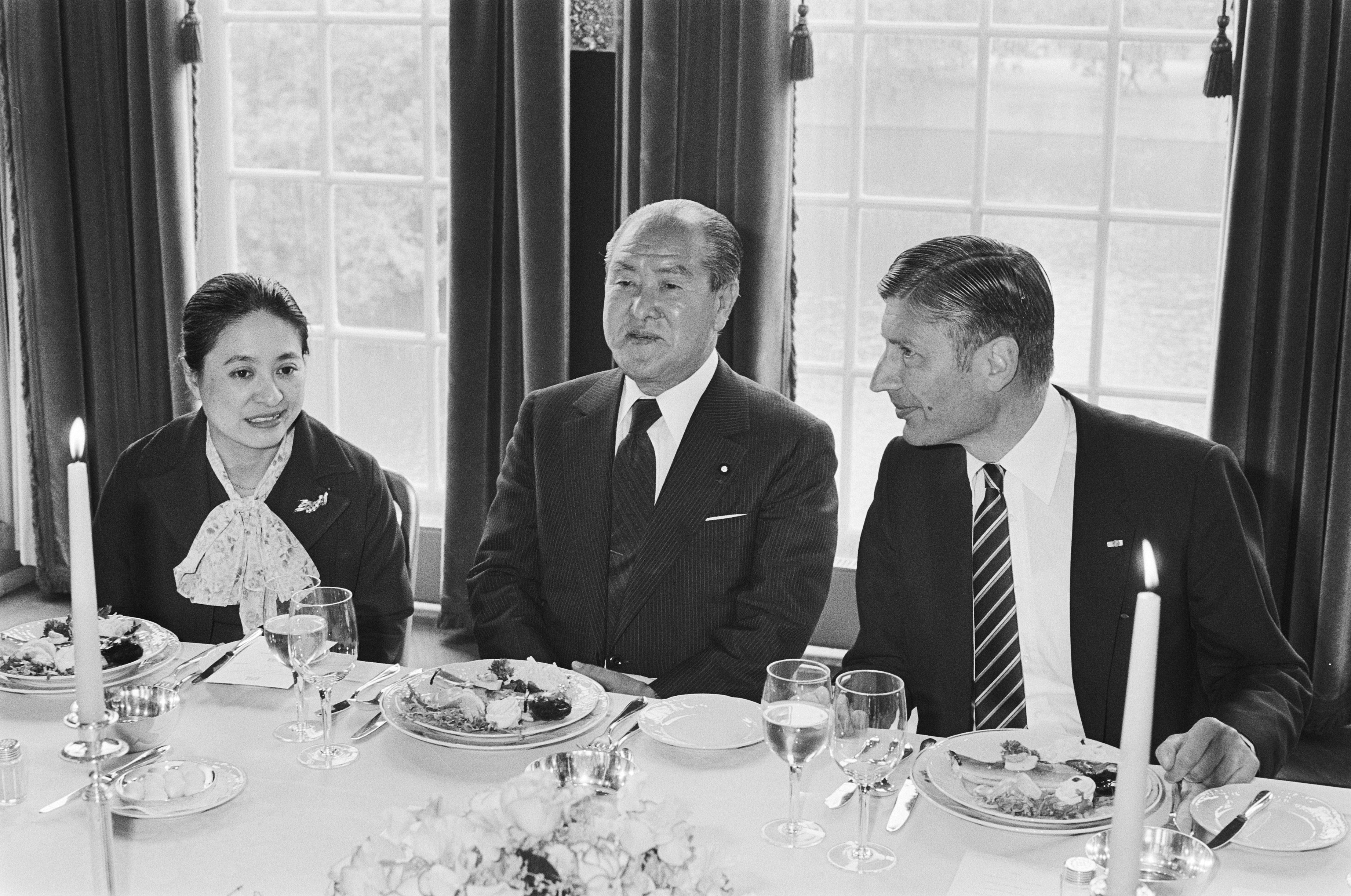 Collectie / Archief : Fotocollectie Anefo Reportage / Serie : [ onbekend ] Beschrijving : Japanse premier Suzuki in Nederland;mevrouw Kurokochi (Ambassaderaad), premier Suzuki en premier Van Agt tijdens officiele lunch Datum : 18 juni 1981 Trefwoorden : lunches Persoonsnaam : Agt, Dries van, Suzuki, Zenko Instellingsnaam : Trêveszaal Fotograaf : Antonisse, Marcel / Anefo Auteursrechthebbende : Nationaal Archief Materiaalsoort : Negatief (zwart/wit) Nummer archiefinventaris : bekijk toegang 2.24.01.05 Bestanddeelnummer : 931-5510